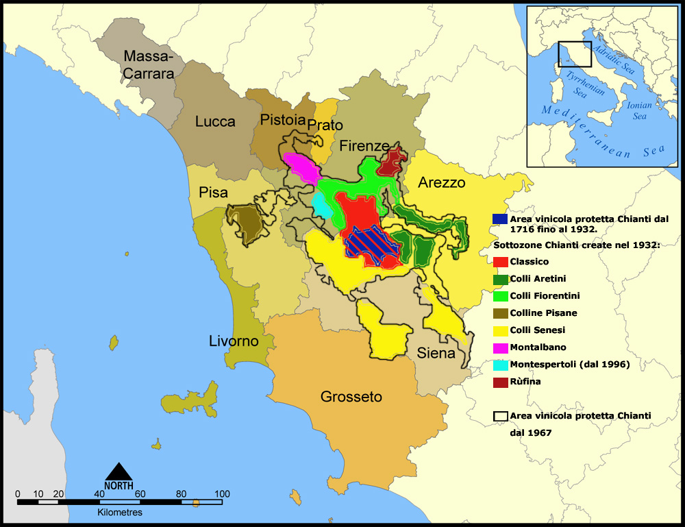 Chianti sub-zones